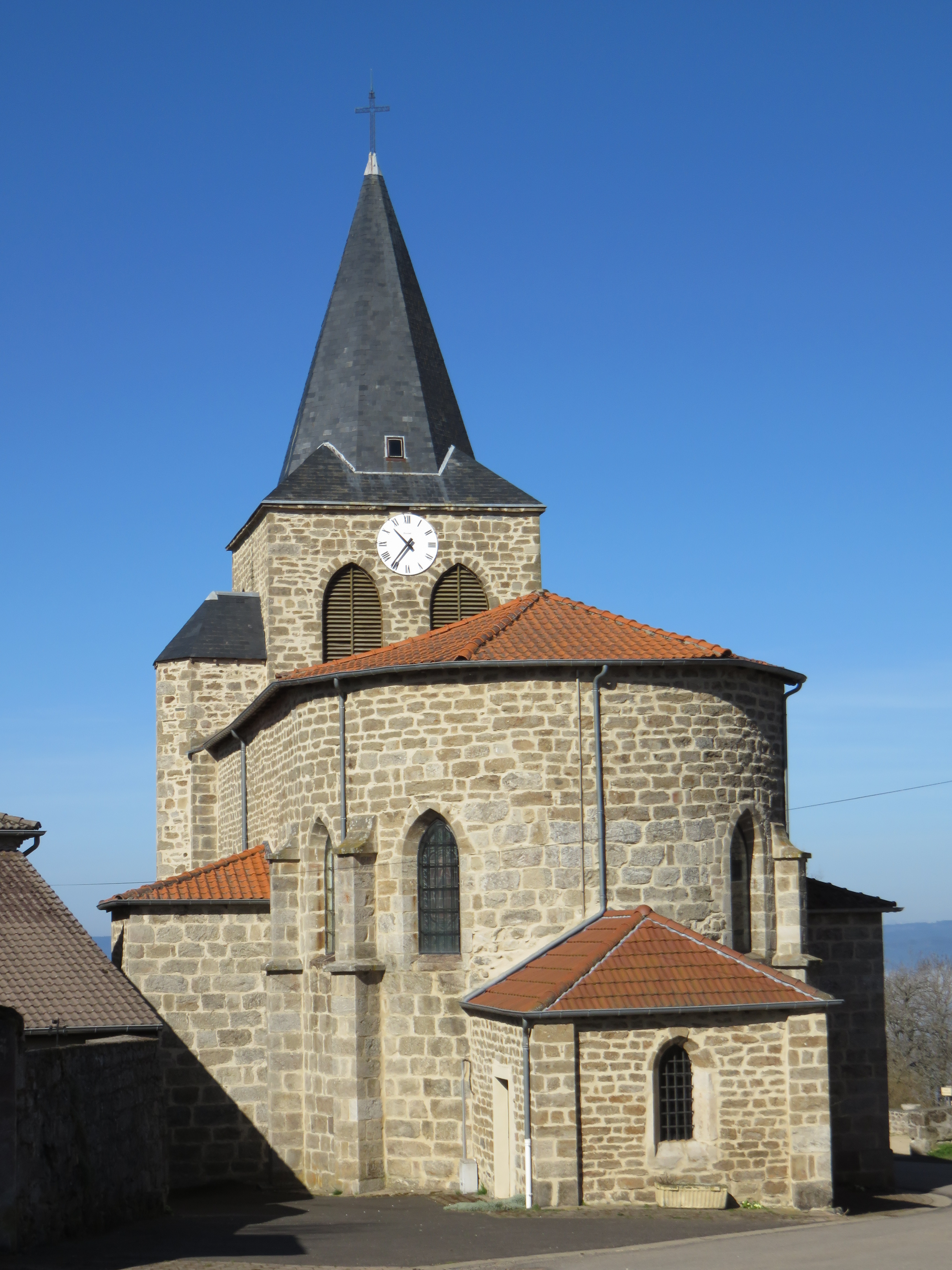 Église de Medeyrolles (Puy-de-Dôme, France).